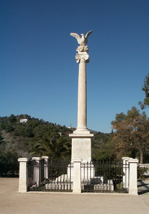 Nea Epidavros. Denkmal für die erste griechische Nationalversammlung vom 20.12.1821